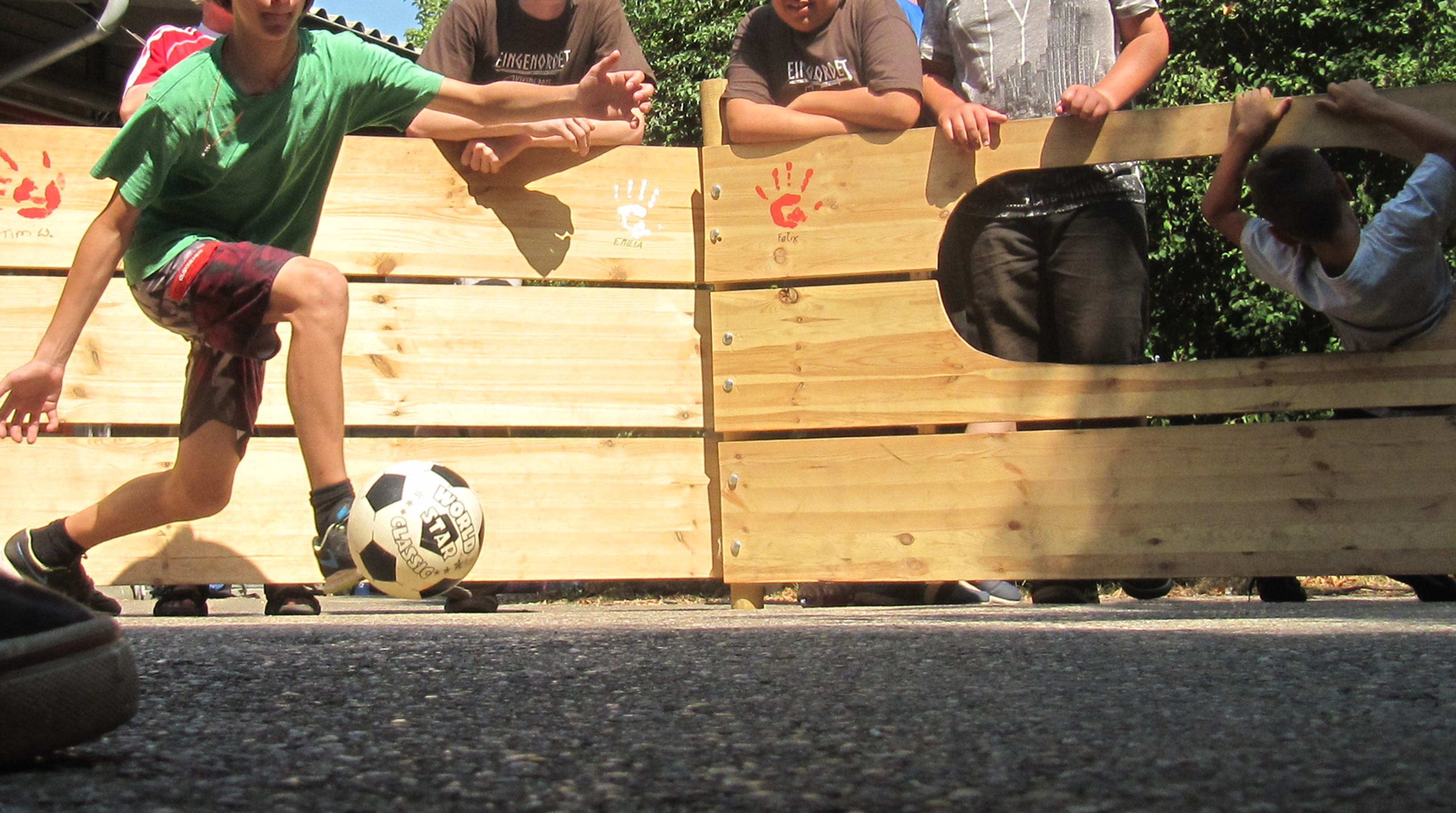 Gagaball Spieler schlägt den Ball, München